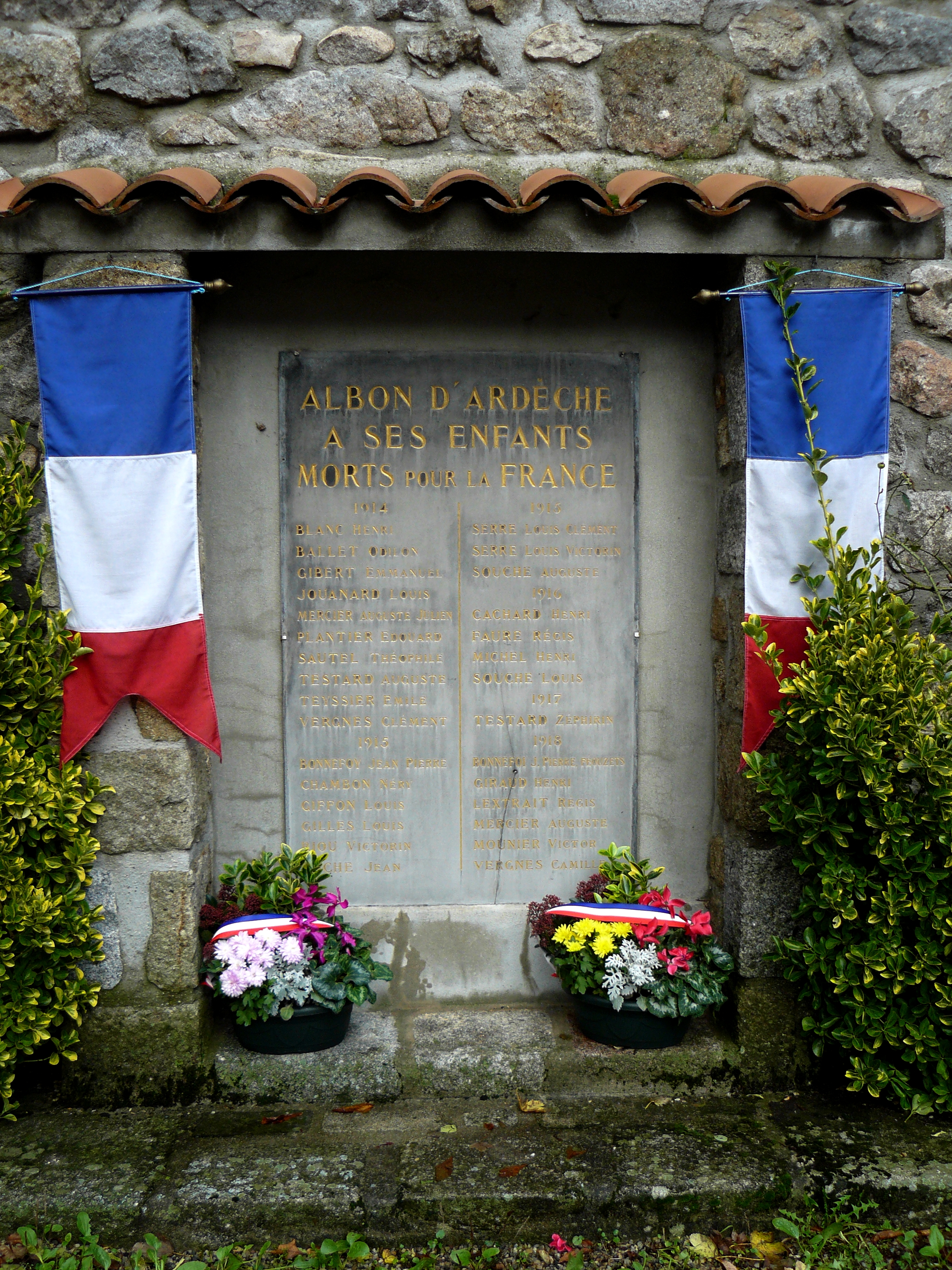 Le monument aux morts du village d'Albon (Ardèche), sur la face Ouest du temple.